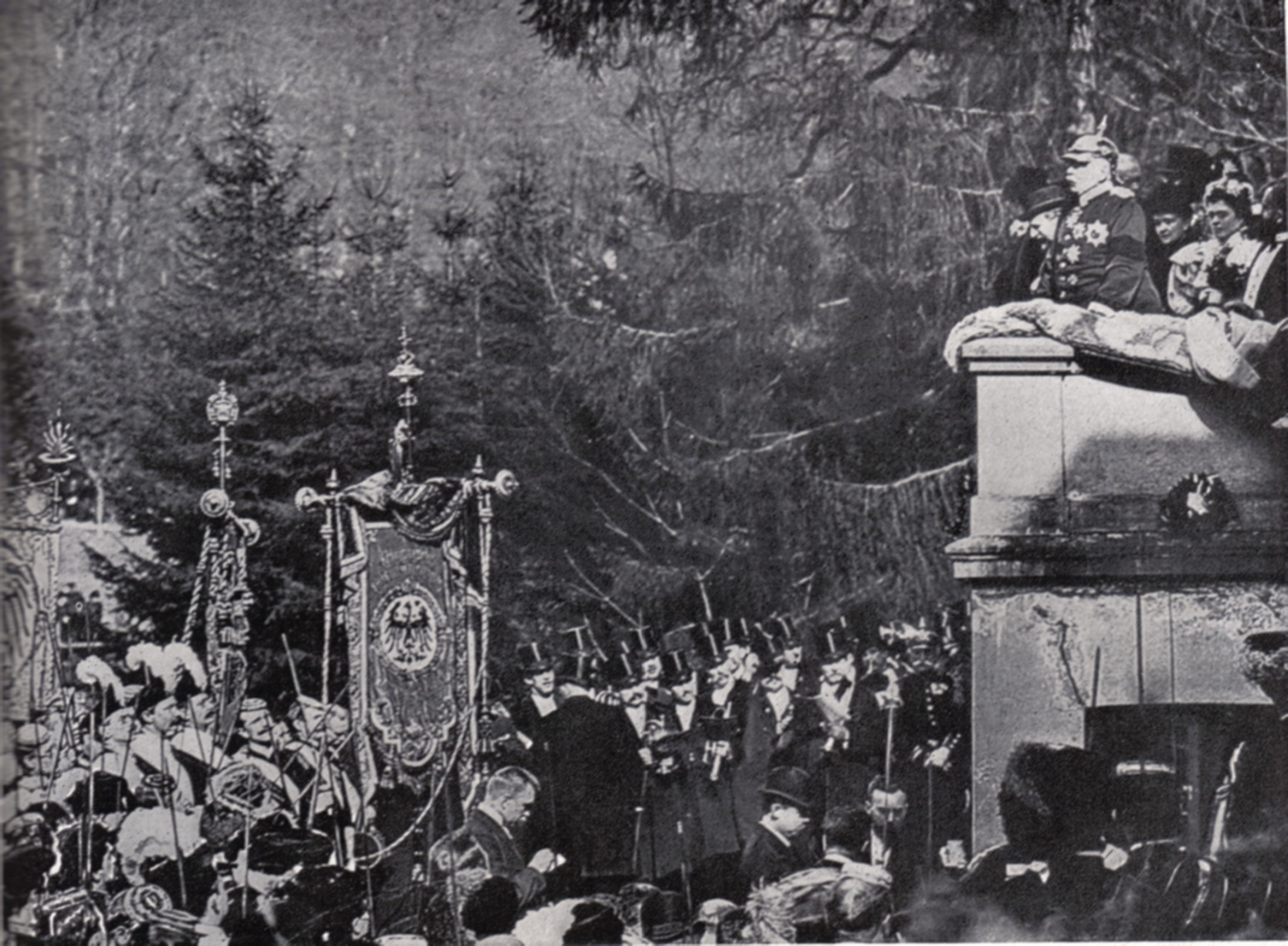 Huldigung von Studenten vor Bismarck zu dessen 80. Geburtstag am 1. April 1895